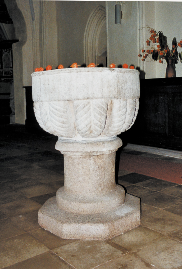 Tauffünte in der Dorfkirche von Garz (Mecklenburg-Vorpommern)